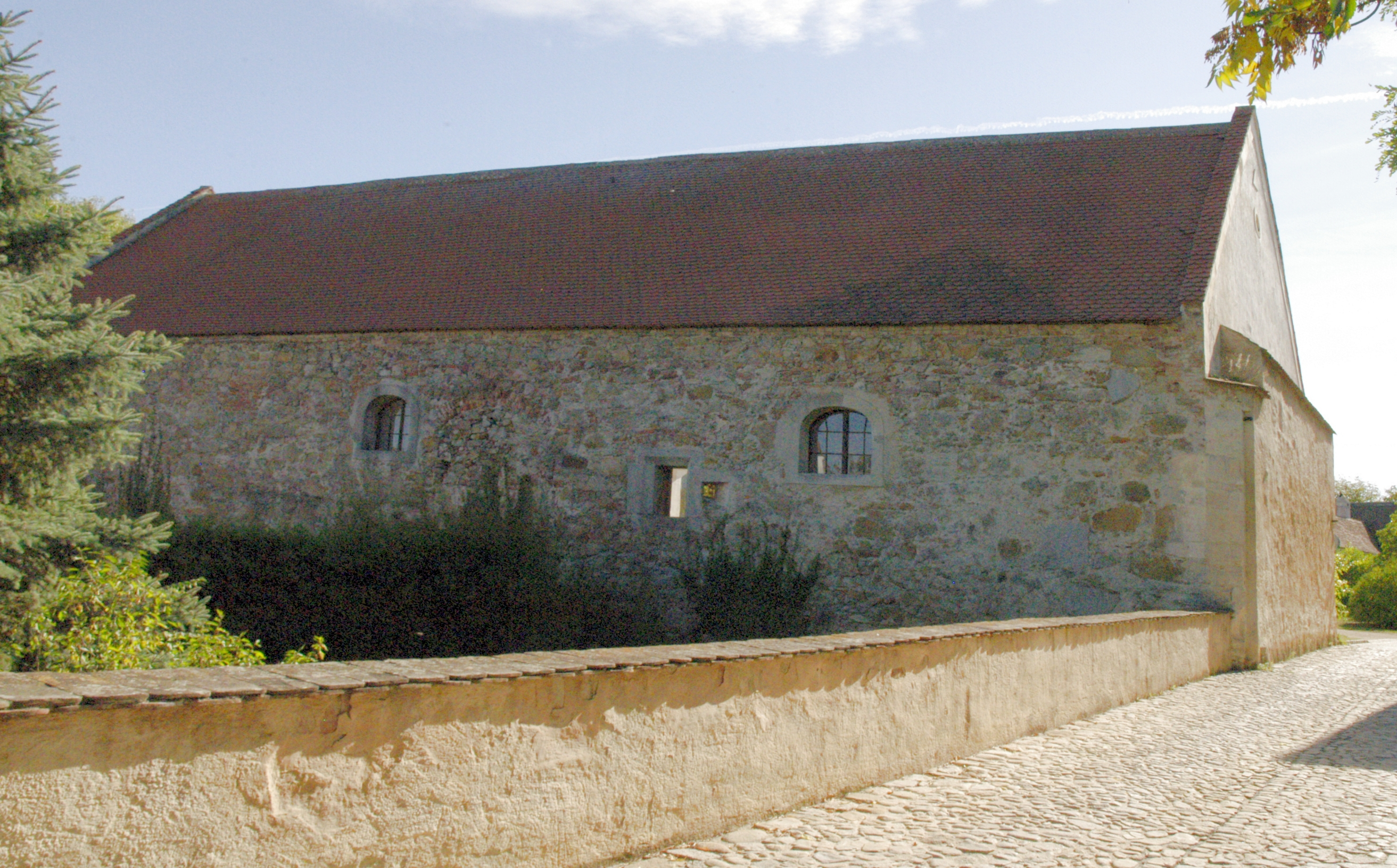 Schloss Schrattenthal / Die gezeigte Fassade der Scheune war früher Außenmauer der Wehranlagen. In der rechten Hälfte der Fassade ist das Schlitzfenster zur Beobachtung und rechts daneben eine nach unten gerichtete Schießscharte zu erkennen.